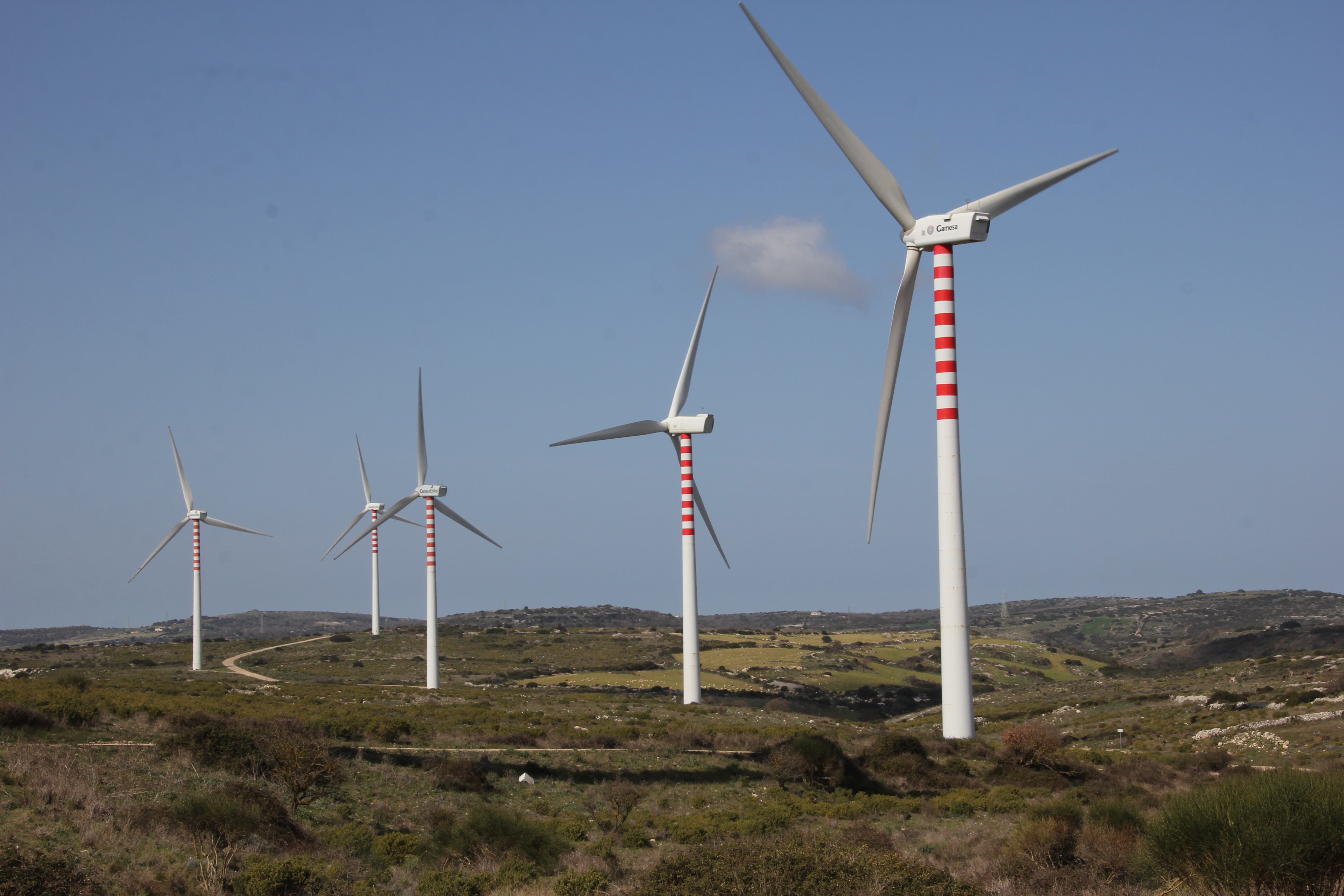 Florinas, parco eolico